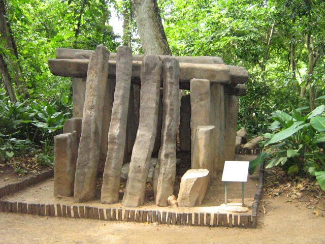 Olmec tomb at La Venta Park, Villahermosa, Mexico.